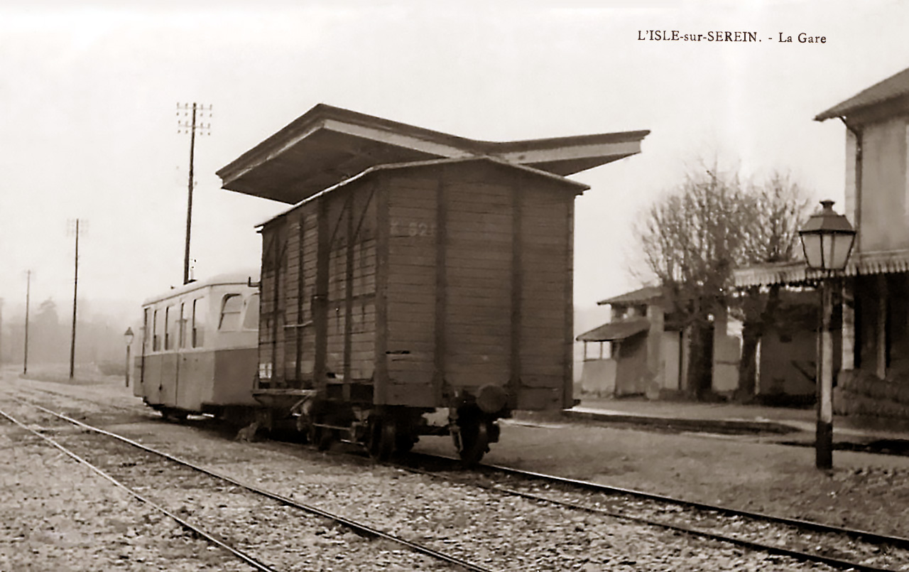 Bahnhof L’Isle-sur-Serein mit Zugkomposition zwischen den Weltkriegen